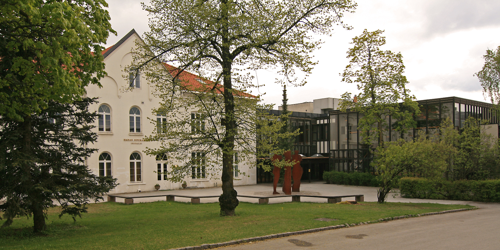 Hamar Seminarium (Høgskolen i Hedmark, avd. Hamar). Reist 1877 - tegnet av Oluf Saxe og Chr. Mellby. Nyere tilbygg fra 1965 tegnet av Are Vesterlid.